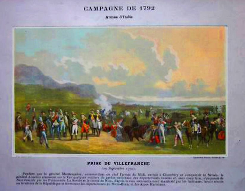 Prise de Villefranche-sur-mer, par le général d'Anselme face au général niçois Thaon de Revel